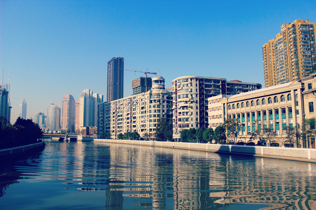 中文（中国大陆）: 上海河滨大楼